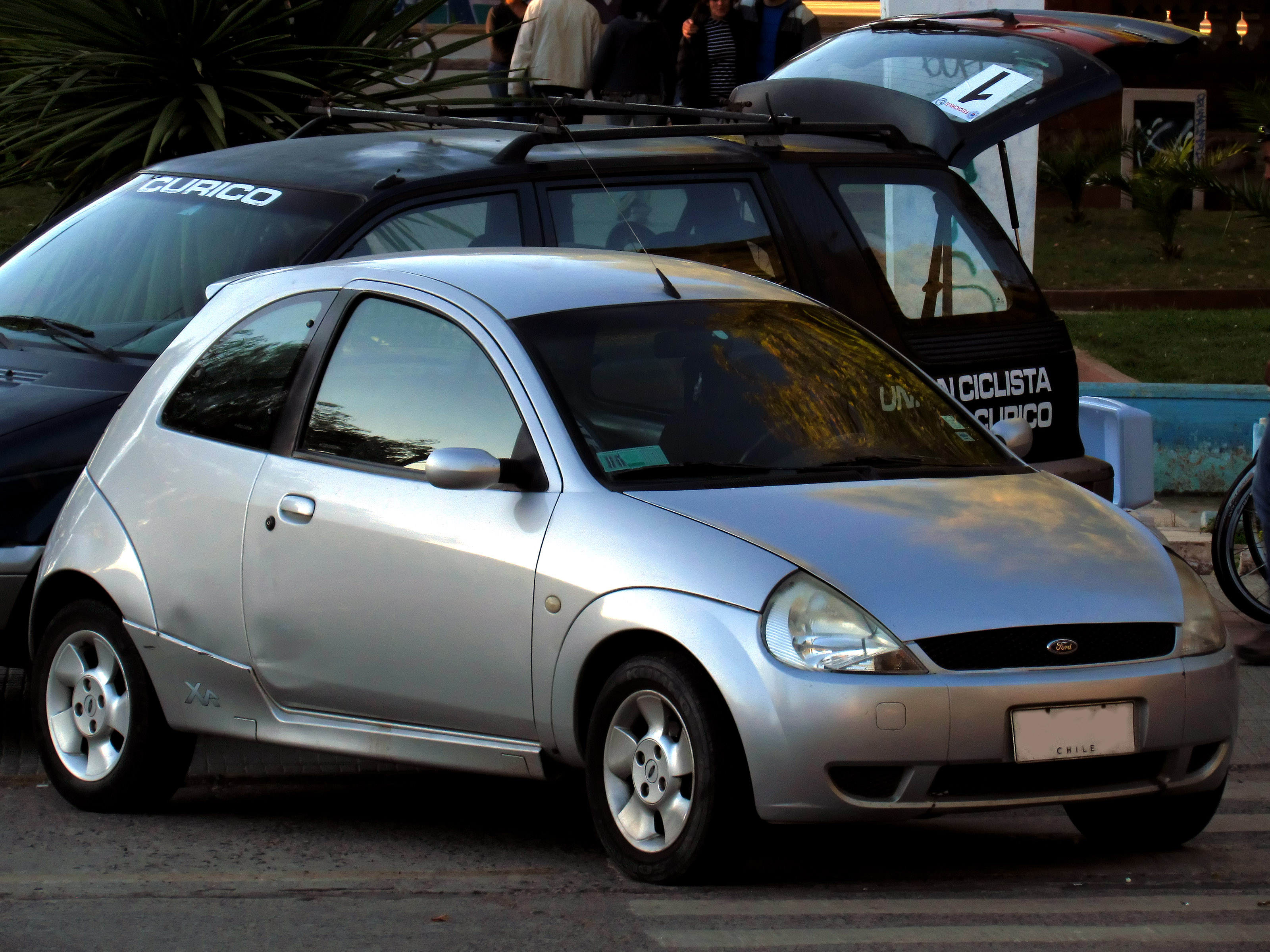 Ford Ka 1.6 XR 2004